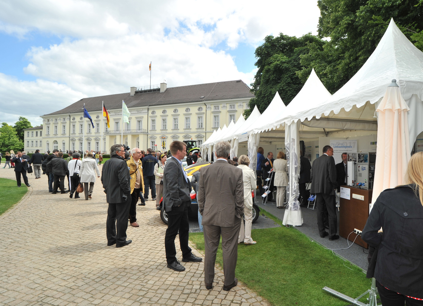 Woche der Umwelt 2012 Auf Einladung des Bundespräsidenten Joachim Gauck präsentierte sich die EnergieAgentur.NRW bei der „Woche der Umwelt“ vom 5. bis 6. Juni 2012 im Park vom Schloss Bellevue. Energiemanagement, Elektromobilität und ein Forum zum Thema „Energie- und klimabewusstes Verhalten“ standen im Mittelpunkt der Präsentation. Flickr tags: Bundespräsident; Joachim Gauck; EnergieAgentur.NRW; Klimaschutz; Woche der Umwelt; 2012; Elektromobilität; Schloss Bellevue